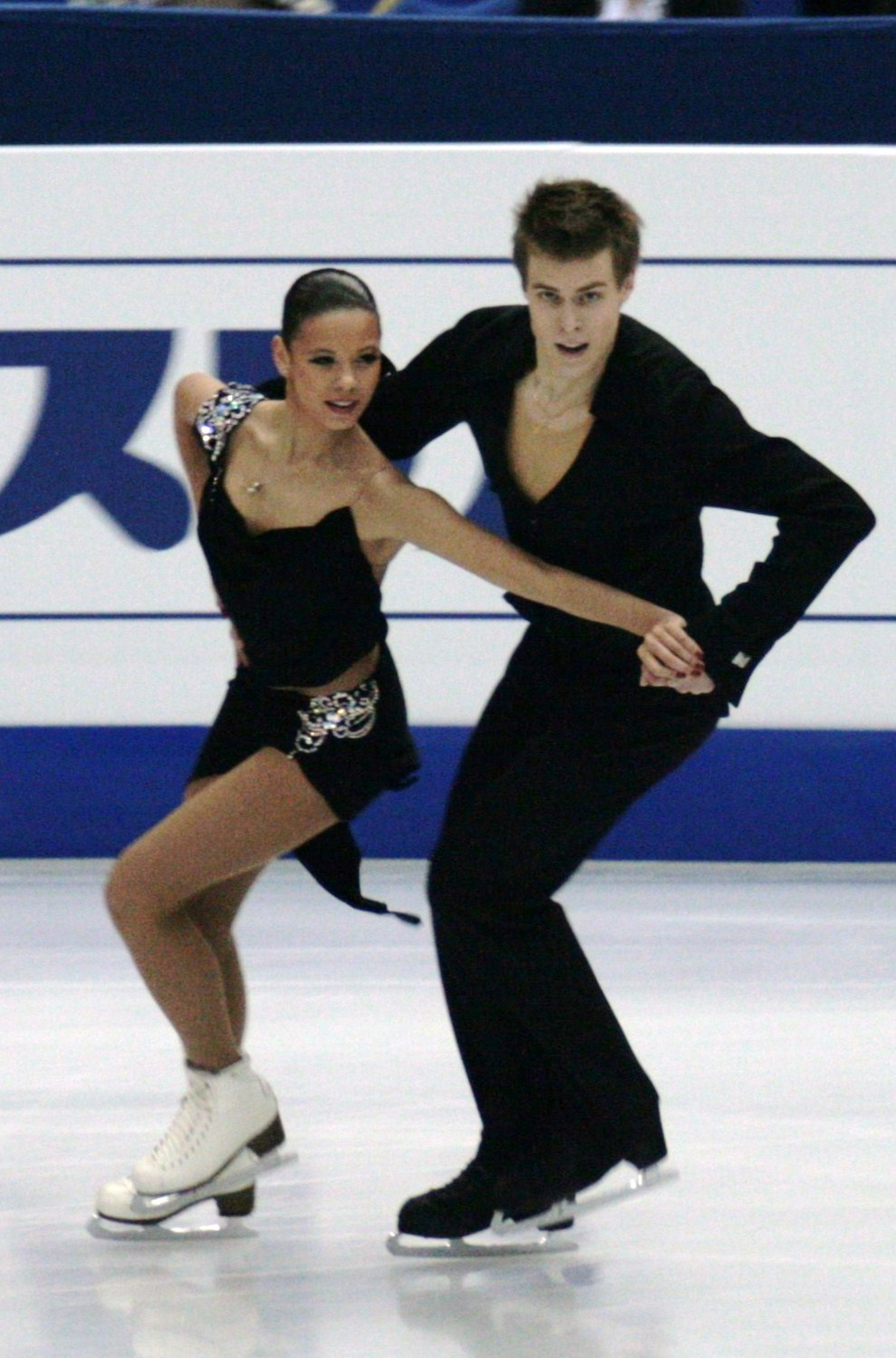 Елена Ильиных и Никита Кацалапов (Россия) на чемпионате мира по фигурному катанию 2012